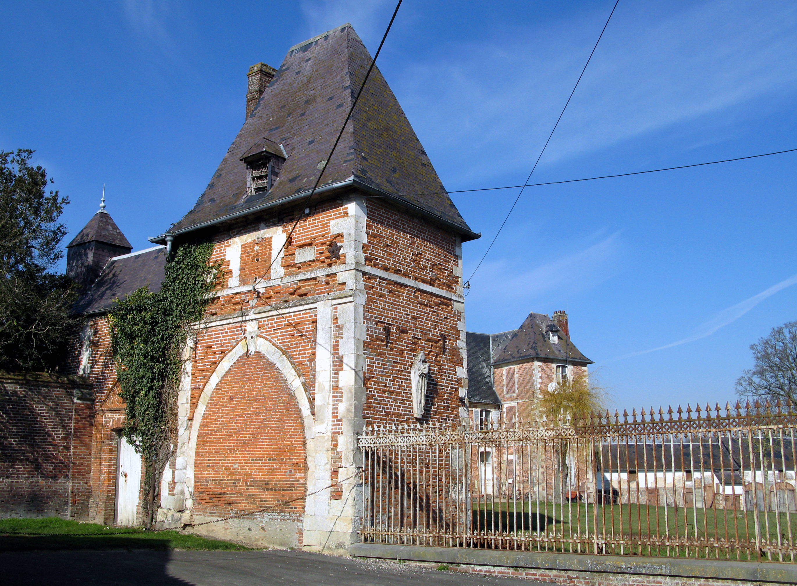 Moyencourt-lès-Poix (Somme, France) - Derrière l'église se trouve l'entrée du château avec, à gauche, un pavillon. . .